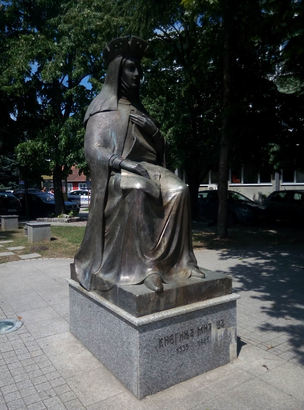 Пам'ятник Миліці Хребелянович в Ягодіні